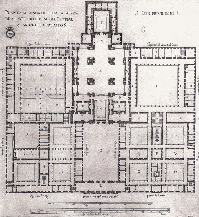 Planta segunda de toda la fabrica de S Laurencio el Real del Escorial al andar del coro alto.